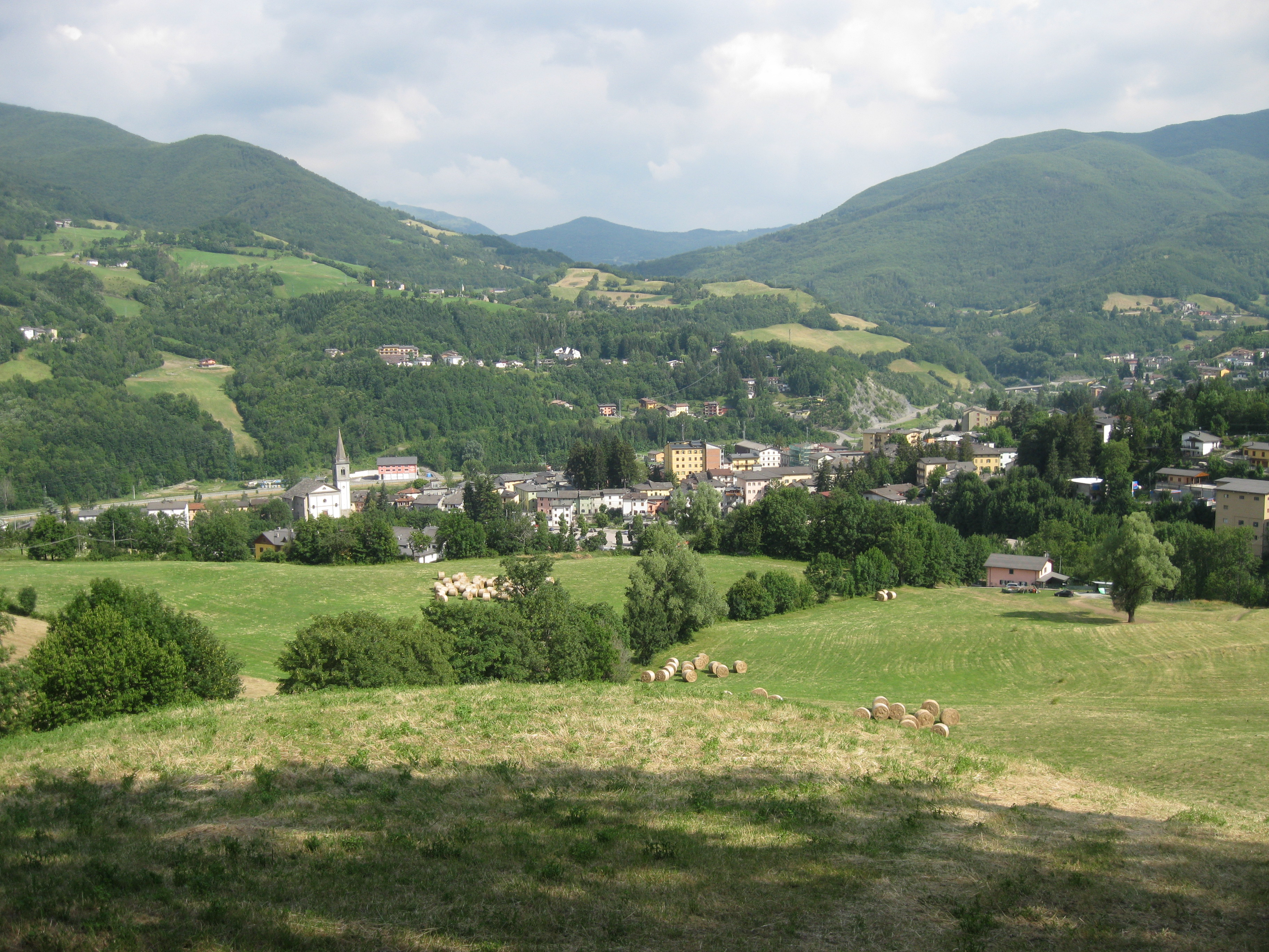 Pievepelago, Italien